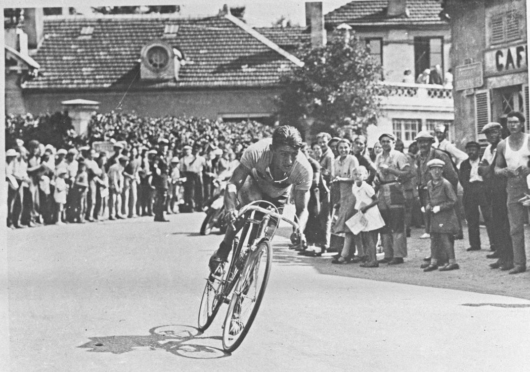 Photographie de René Vietto sur le Tour 1939.